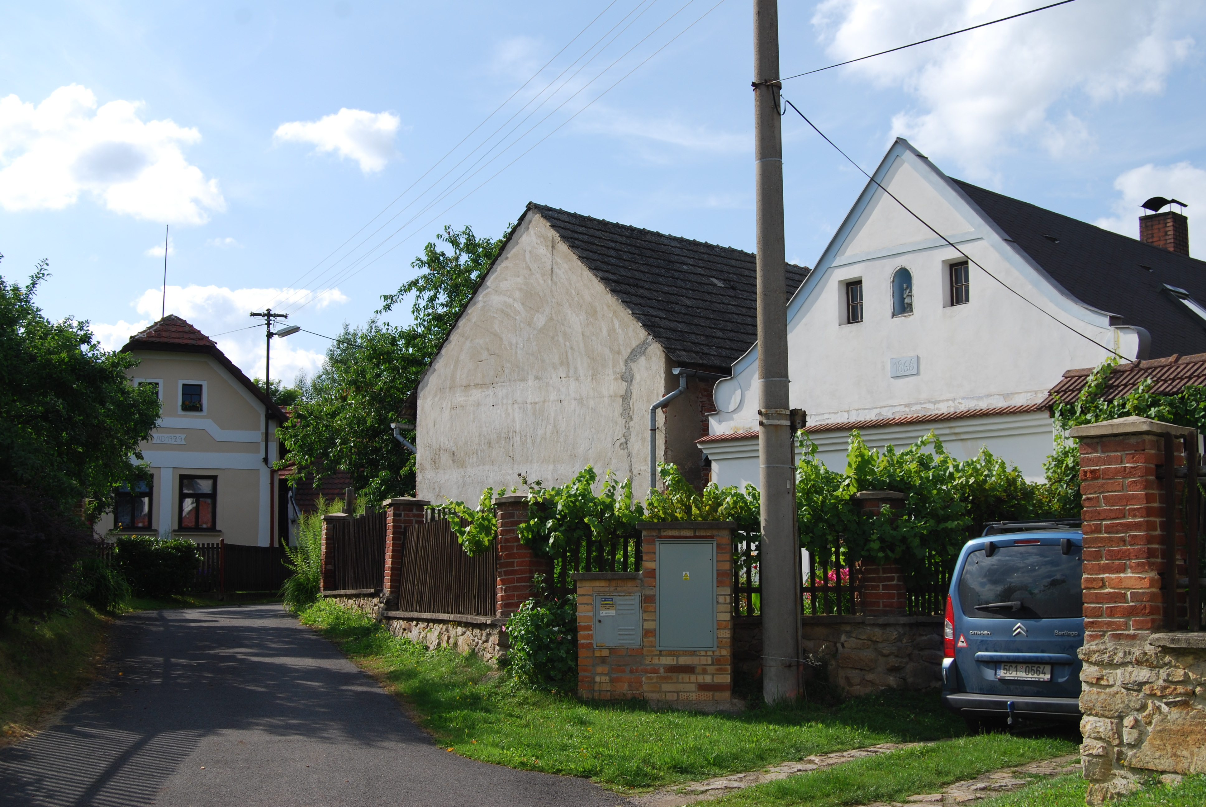 Pohled na část obce. Zběšičky v okrese Písek. Česká republika.